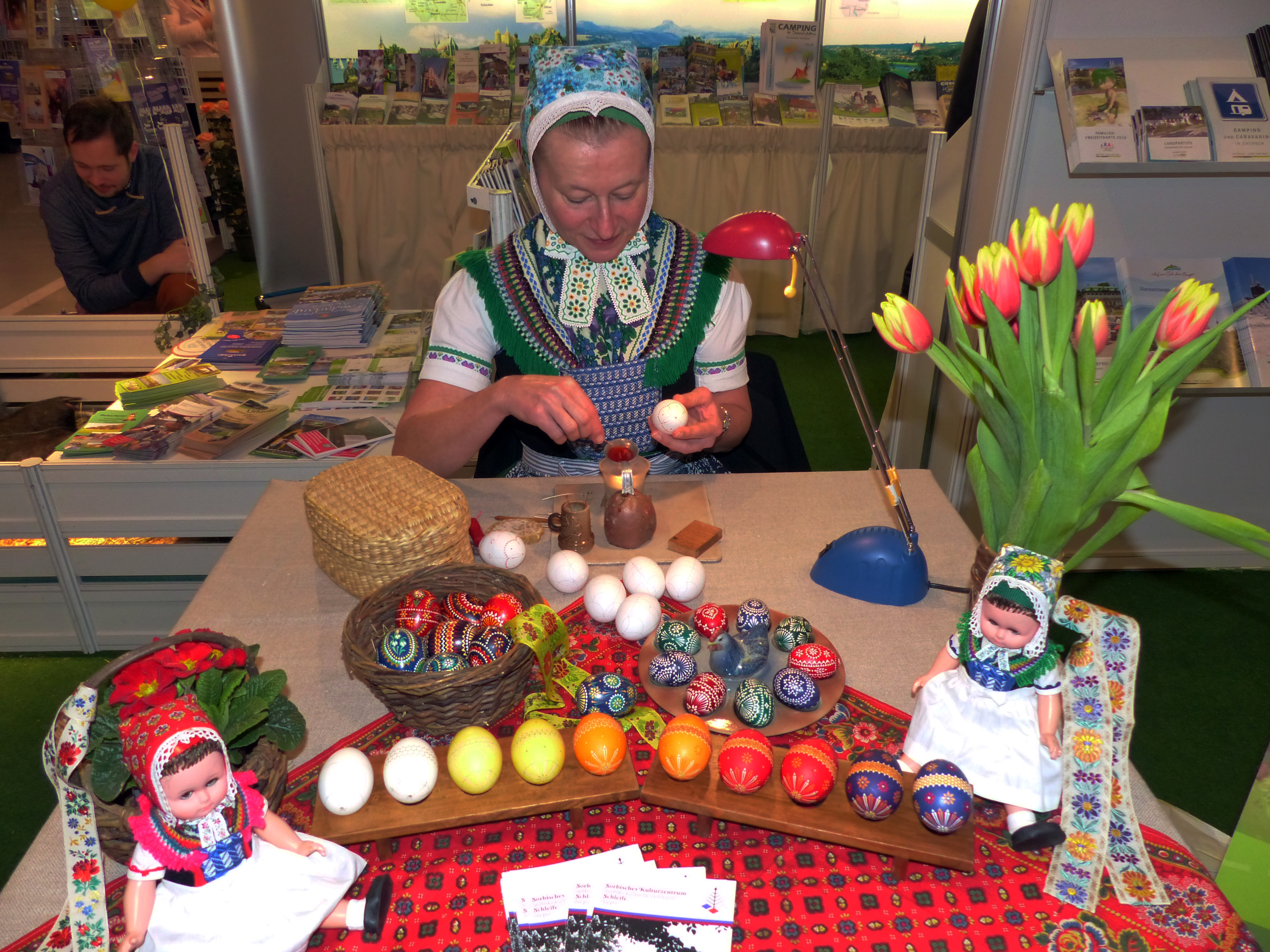 Sorbische Ostereiermalerei in Schleife (Landkreis Görlitz)